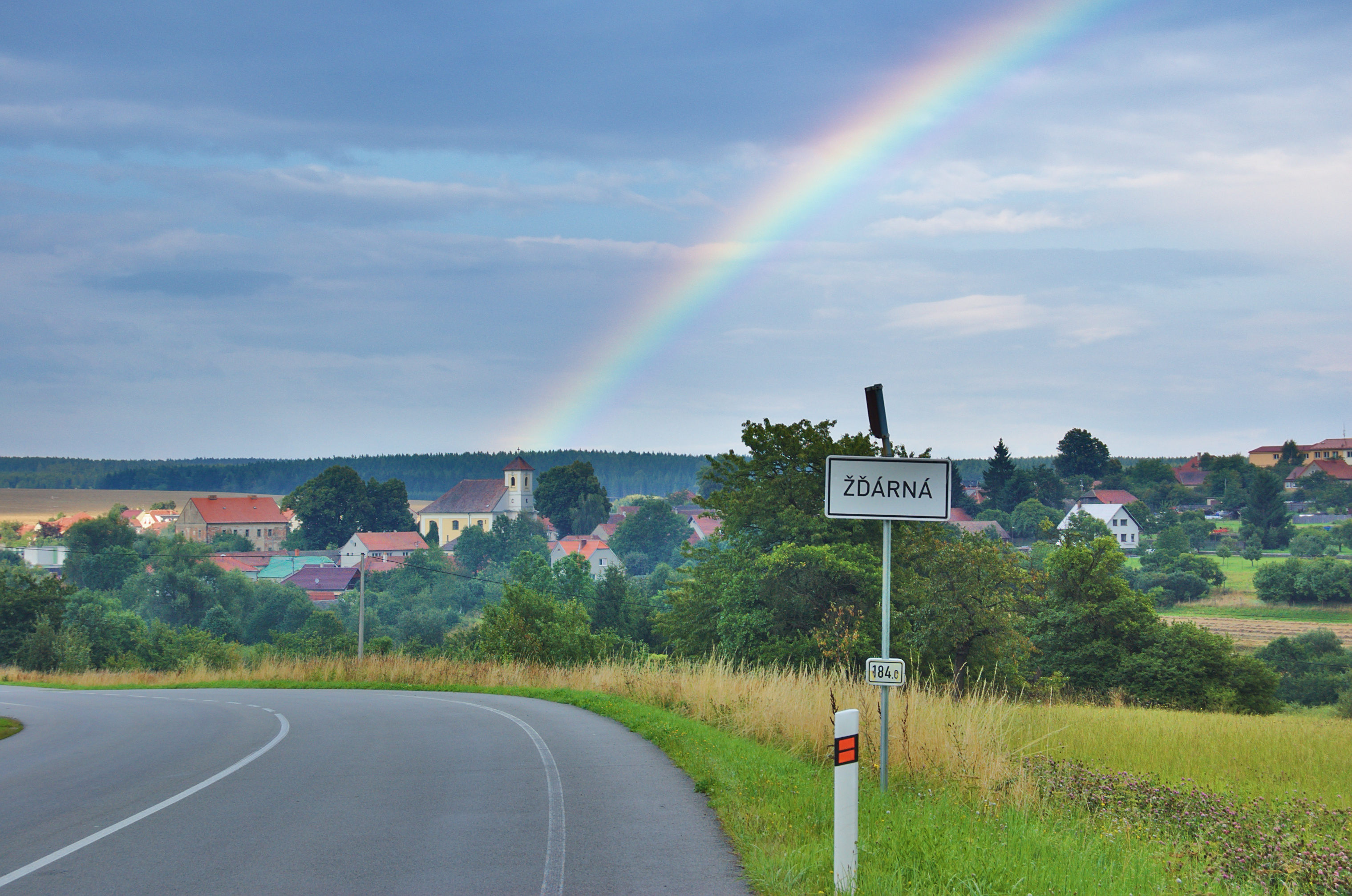 Kostel svatého Bartoloměje, Žďárná, okres Blansko